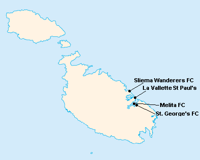 Répartition des clubs en First Division Maltaise 1938-1939.